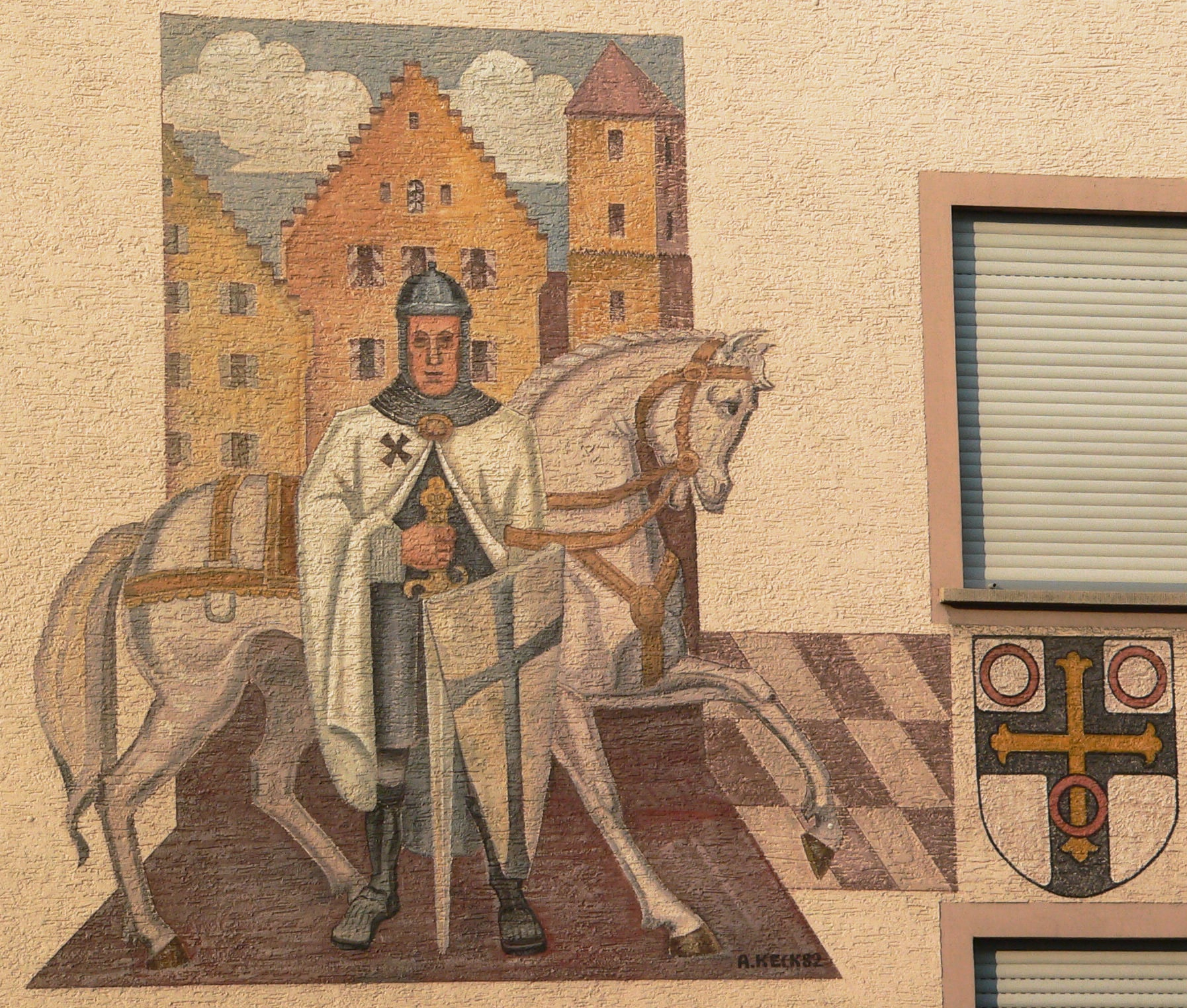 Knight of the Order of Knighthood "Deutscher Orden"